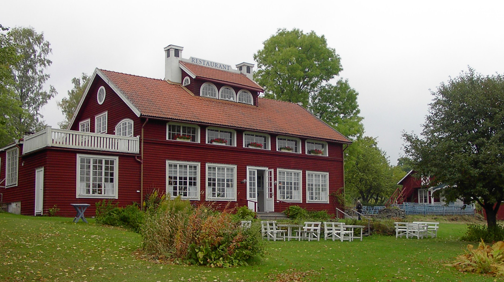 Sillegårdens verksamhet byggdes upp av Ida Sahlström.